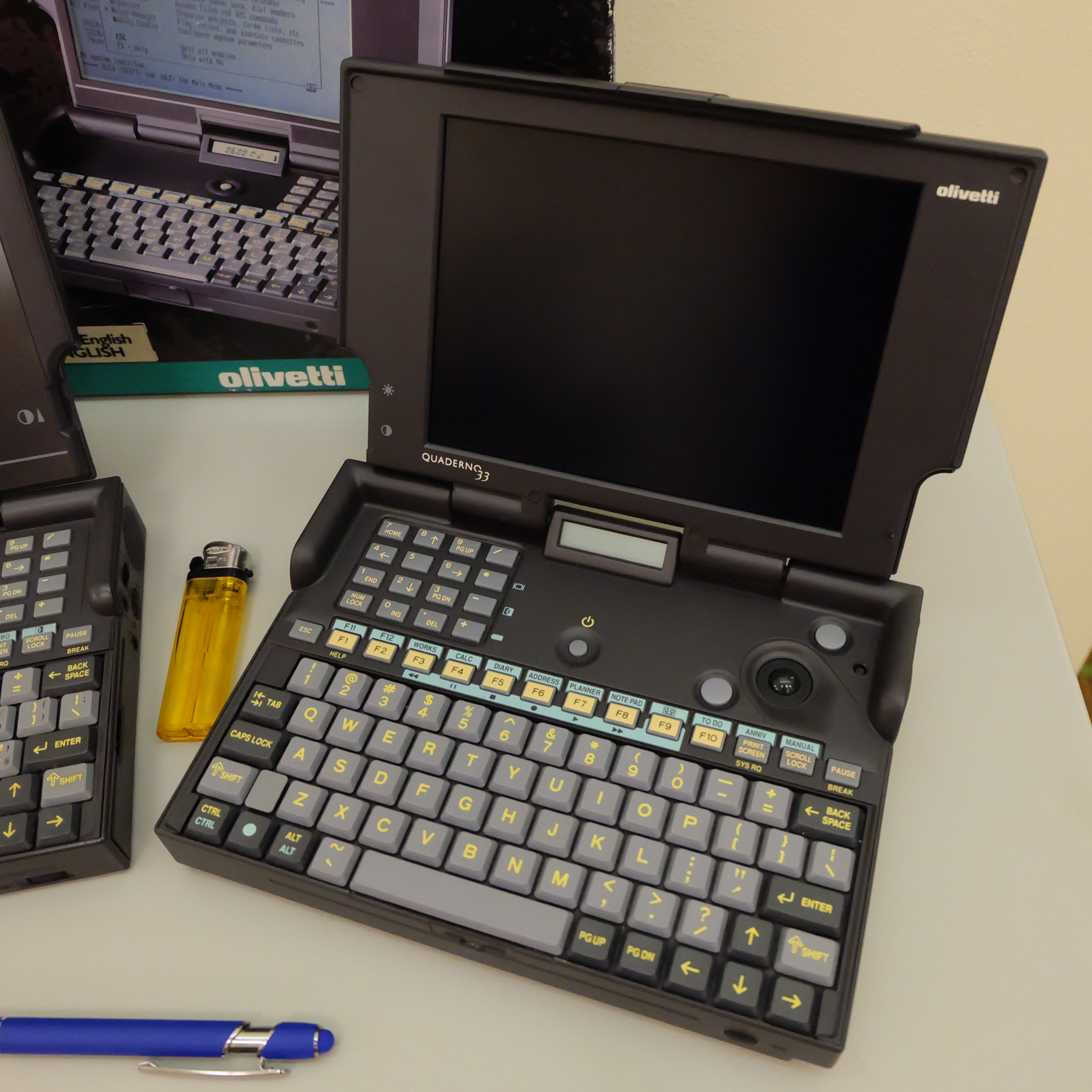 Olivetti Quaderno 33 (PT-AT-60). CPU Intel 80386, RAM 4MB, HDD 60MB, TRACBALL, Windows 3.0